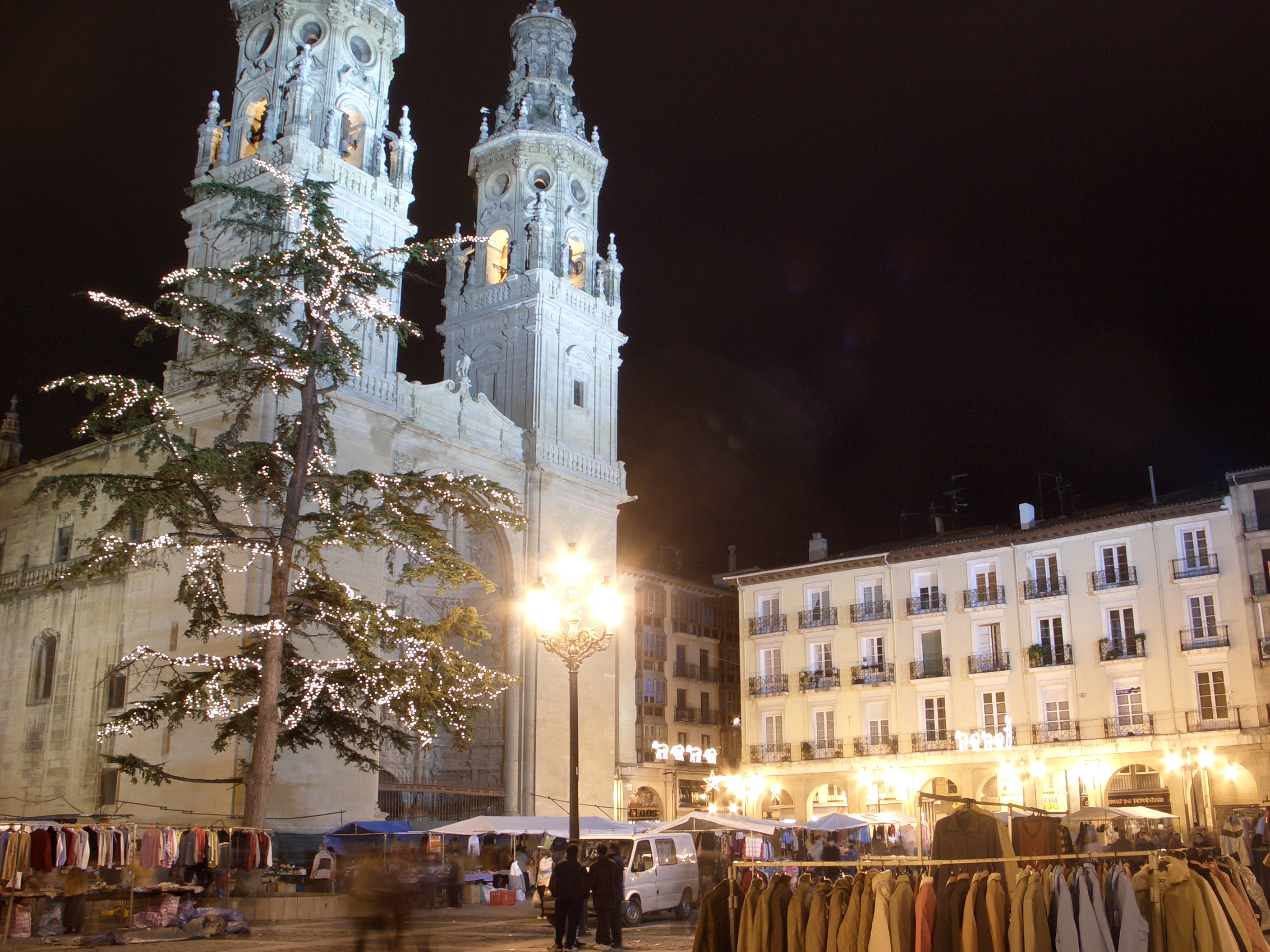 Logroño - Catedral